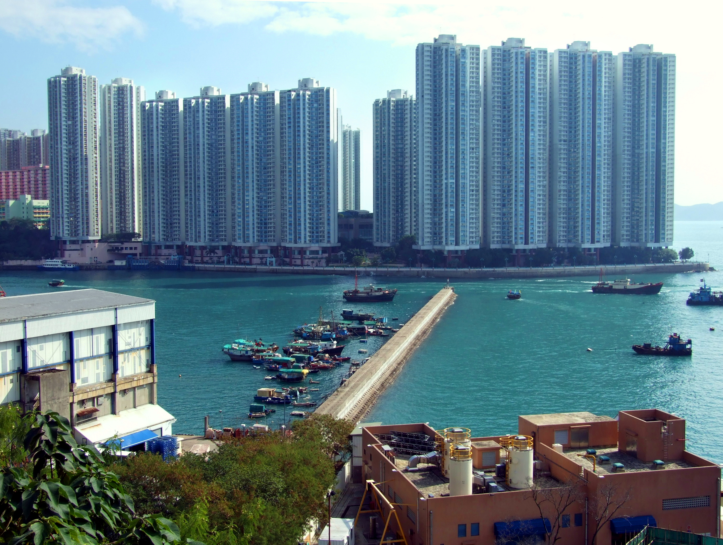 中文（香港）: 海怡半島第1及第2期